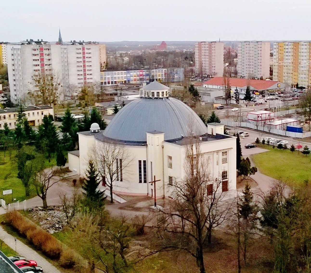 Kościół Chrystusa Króla w Toruniu11